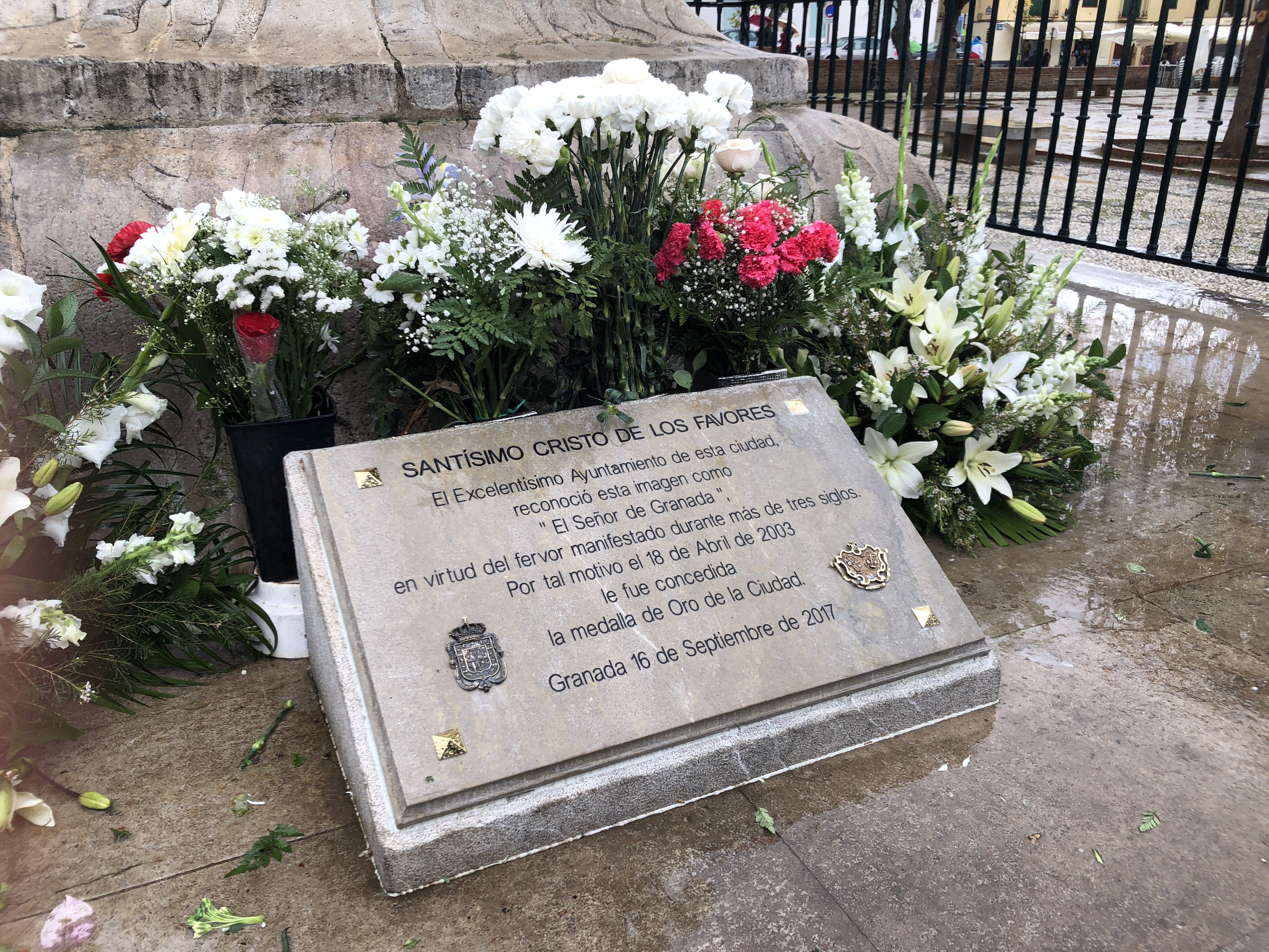 El excelentísimo Ayuntamiento de Granada reconoció al Cristo de los Favores como Señor de Granada por su gran devoción en la ciudad desde el 1640.